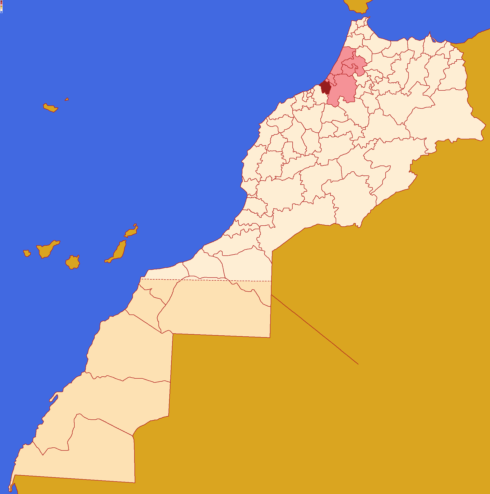 Localização da prefeitura de Skhirate-Témara dentro da região de Rabate-Salé-Quenitra e dentro de Marrocos. Conforme a reforma administrativa de 2015.